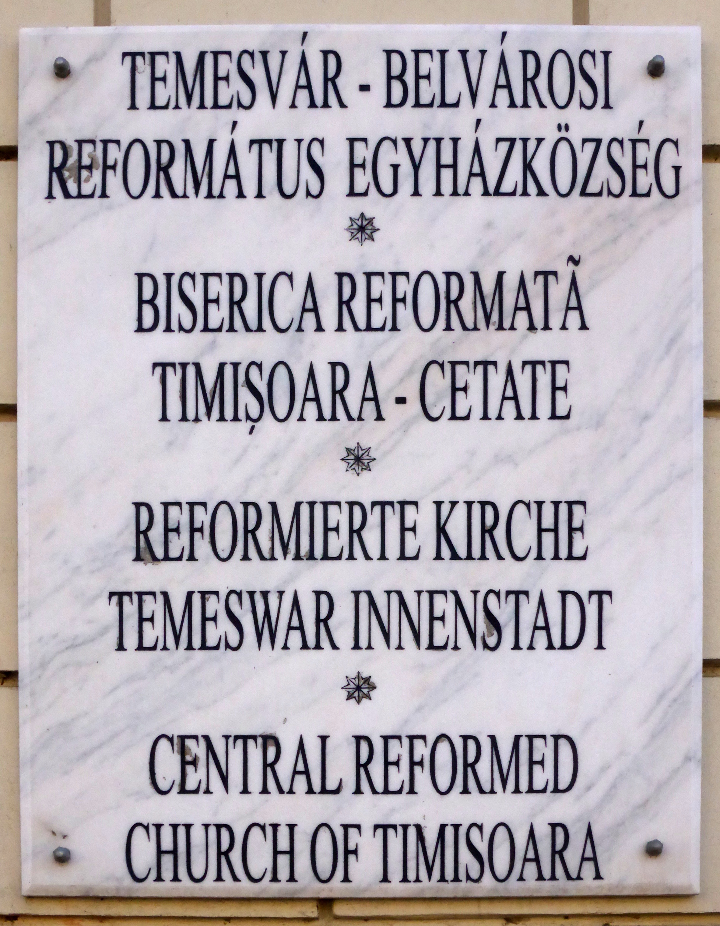 Viersprachige Tafel an der Reformierten Kirche Temeswar Innenstadt (RO).